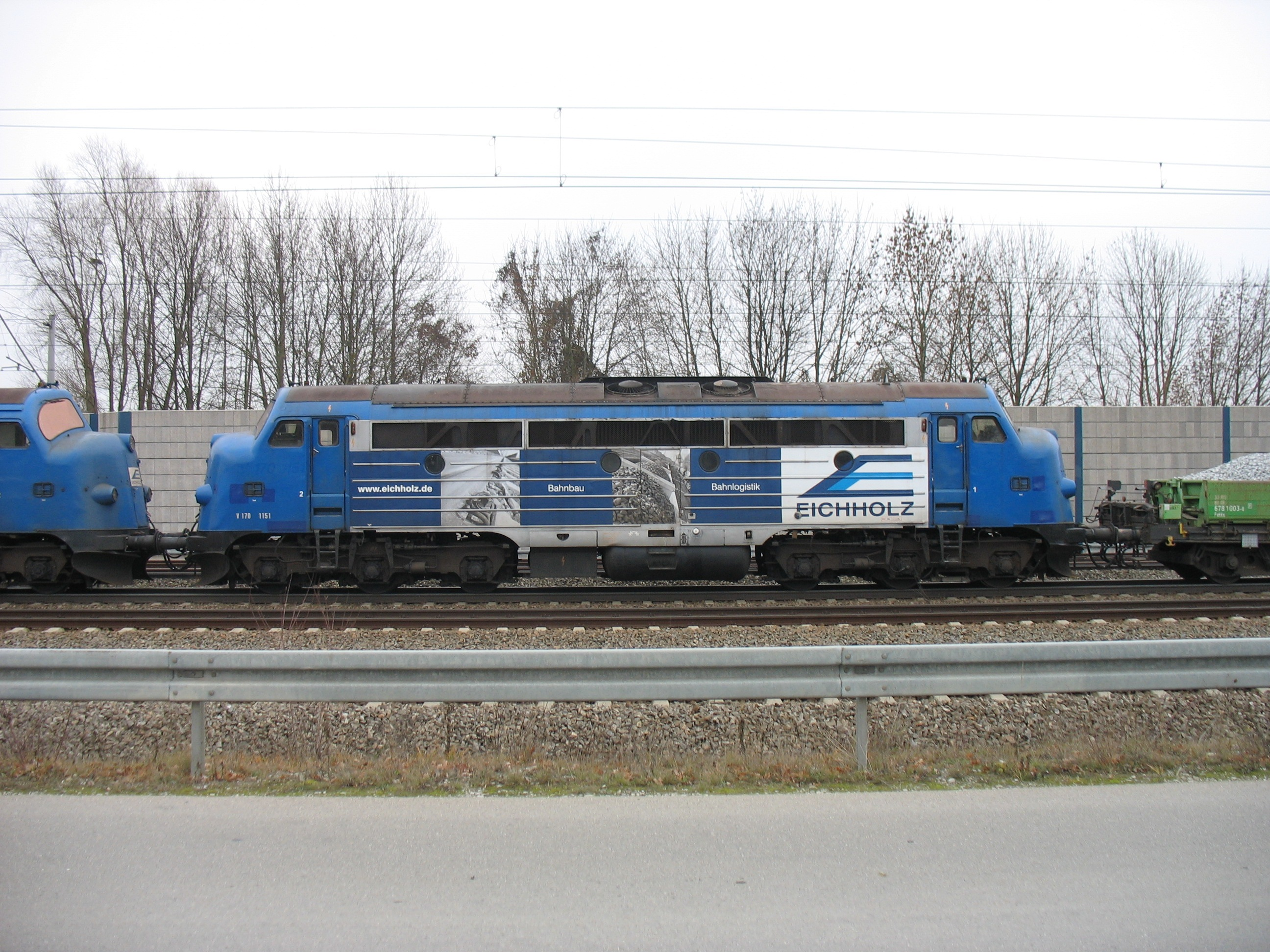 Lokomotive